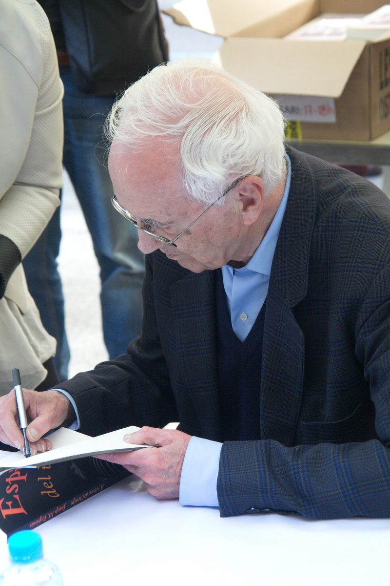 Signatura de llibres en la Diada de Sant Jordi-2015 a Barcelona